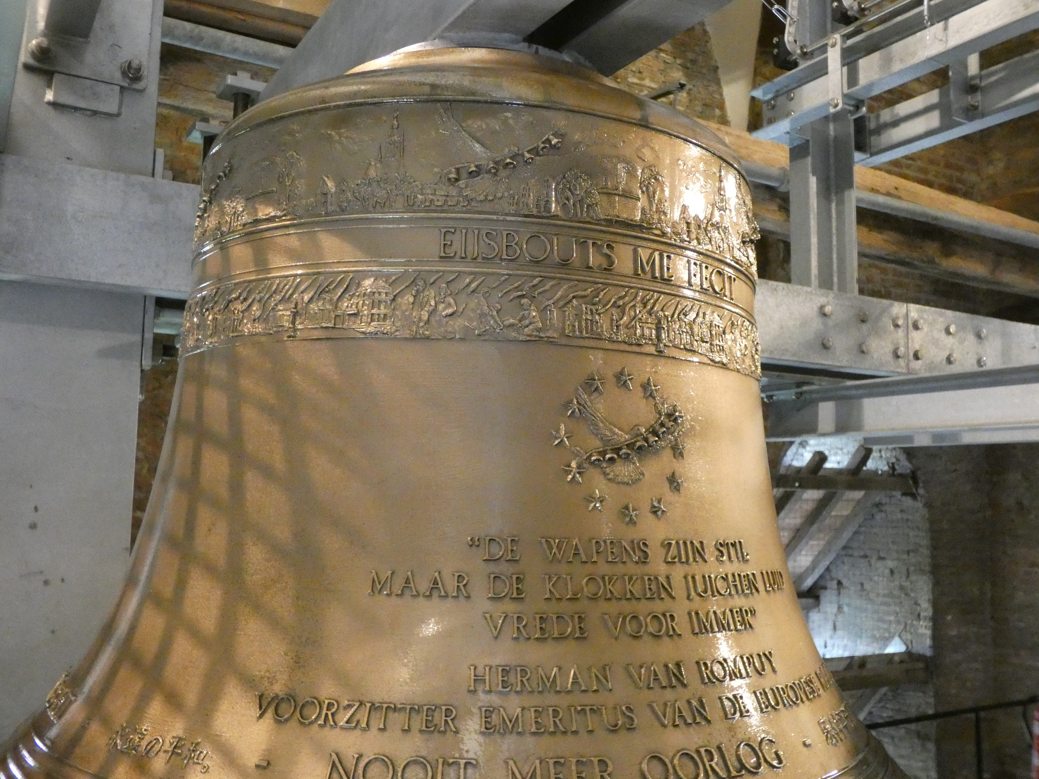 Haiku van voorzitter-emeritus van de Europese Raad Herman van Rompuy op de grootste klok van de Vredesbeiaard van Aarschot. Deze klok werd in 2018 gegoten door de Koninklijke Eijsbouts Klokkengieterij van Asten (Nederland)